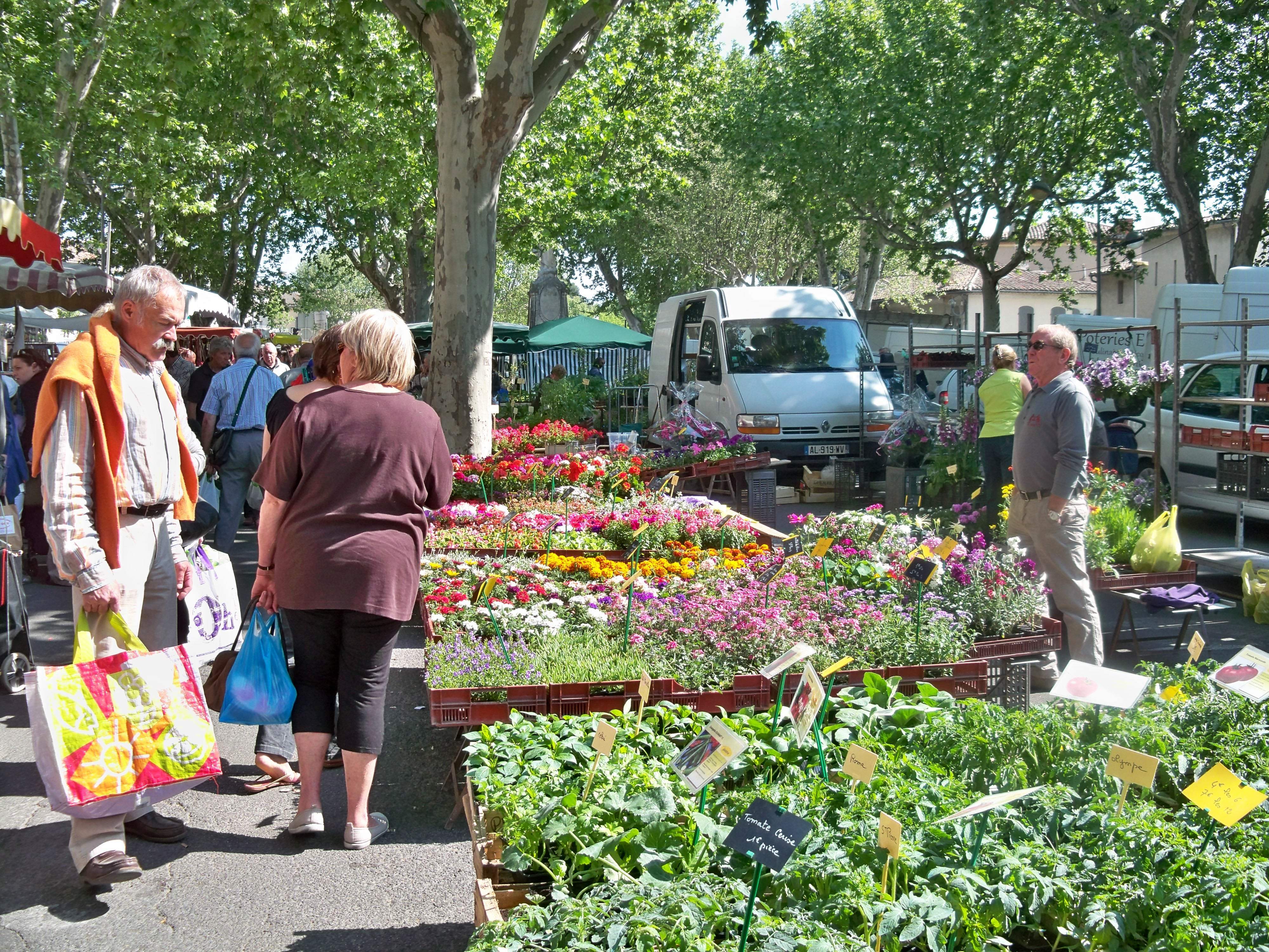 Marché hebdomadaire de Carpentras (84)